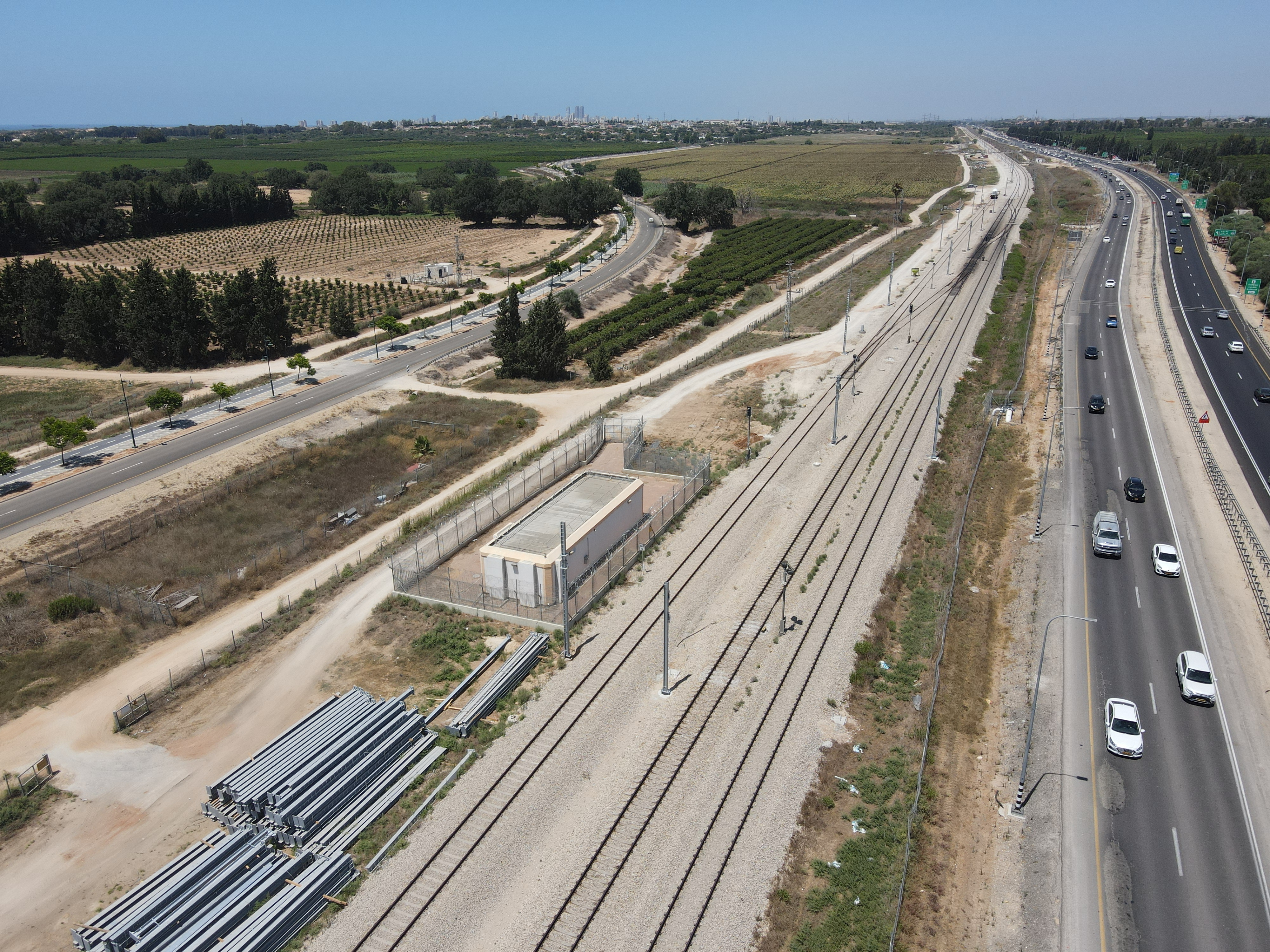 תחנת הרכבת התפעולית ניצנים